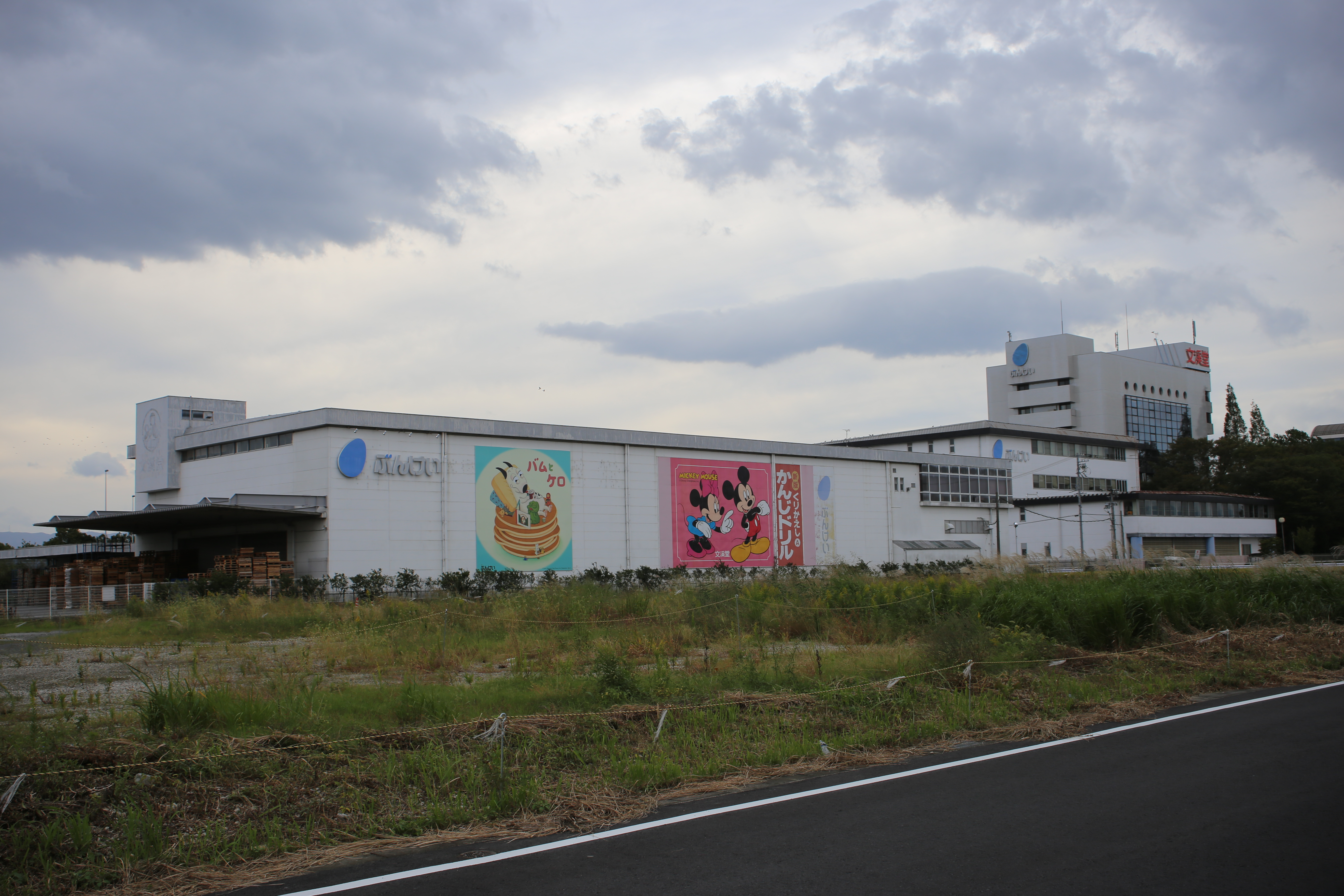 岐阜県羽島市の文溪堂本社